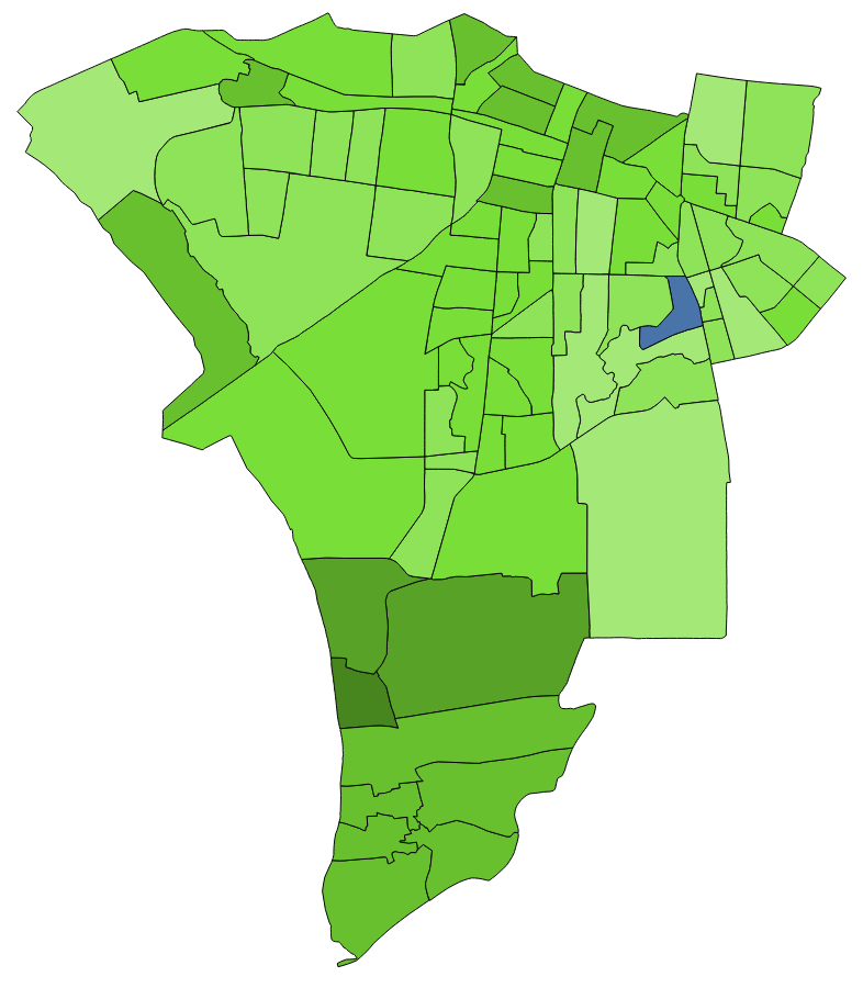 中文（台灣）: 顏色對照表